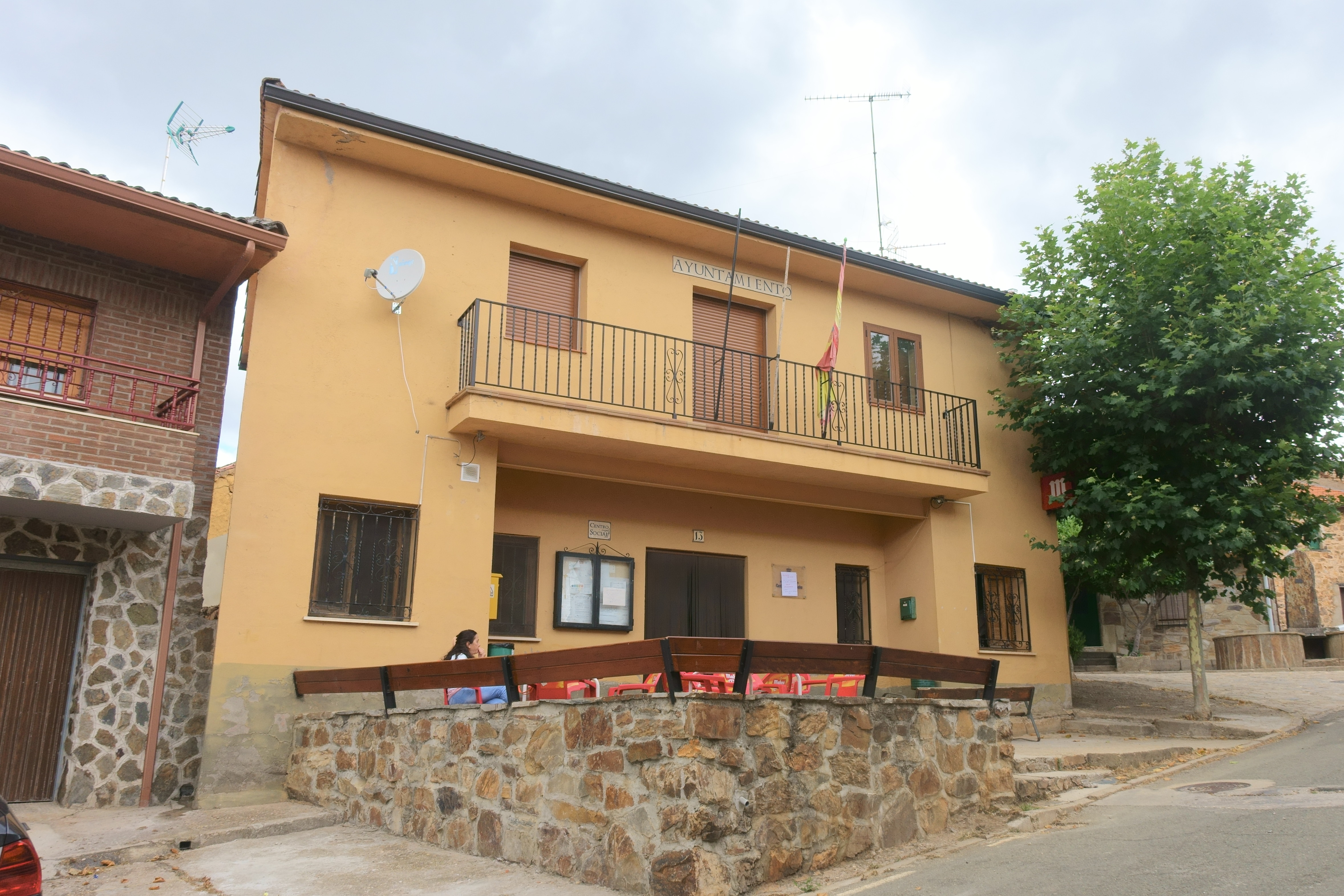 Casa consistorial de Arroyo de las Fraguas (Guadalajara, España).